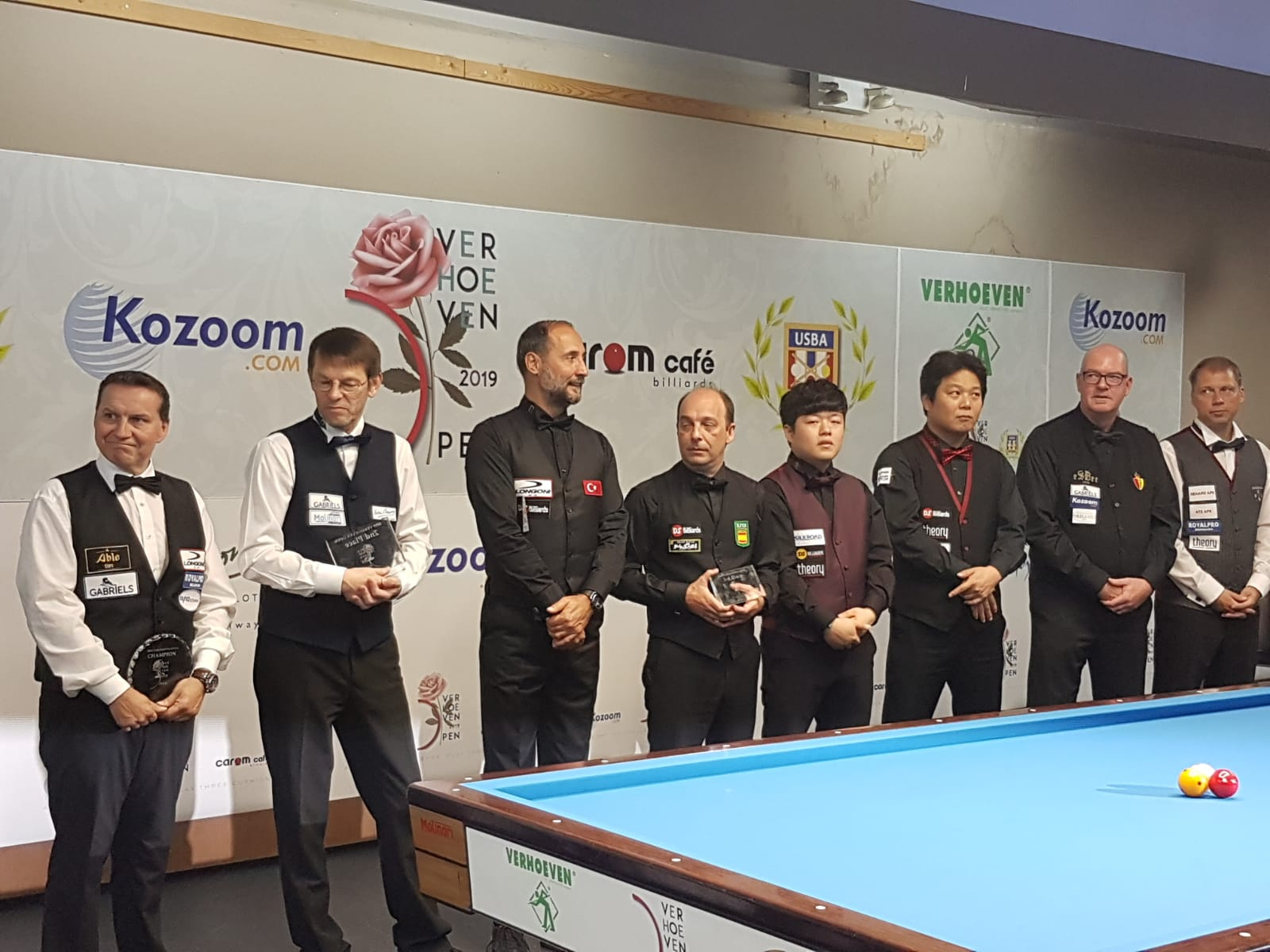 s. Dateiname